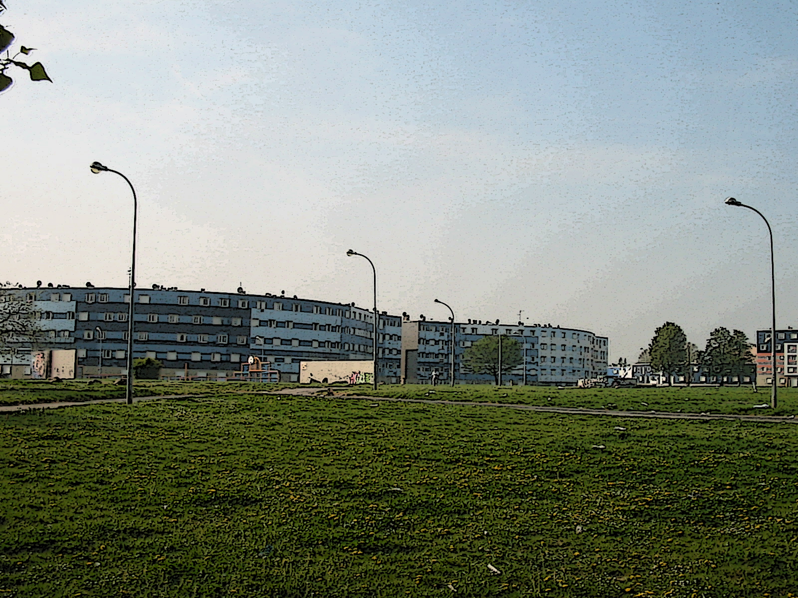 France - Ile-de-France - Essonne - Grigny - La Grande Borne - Plaine Centrale